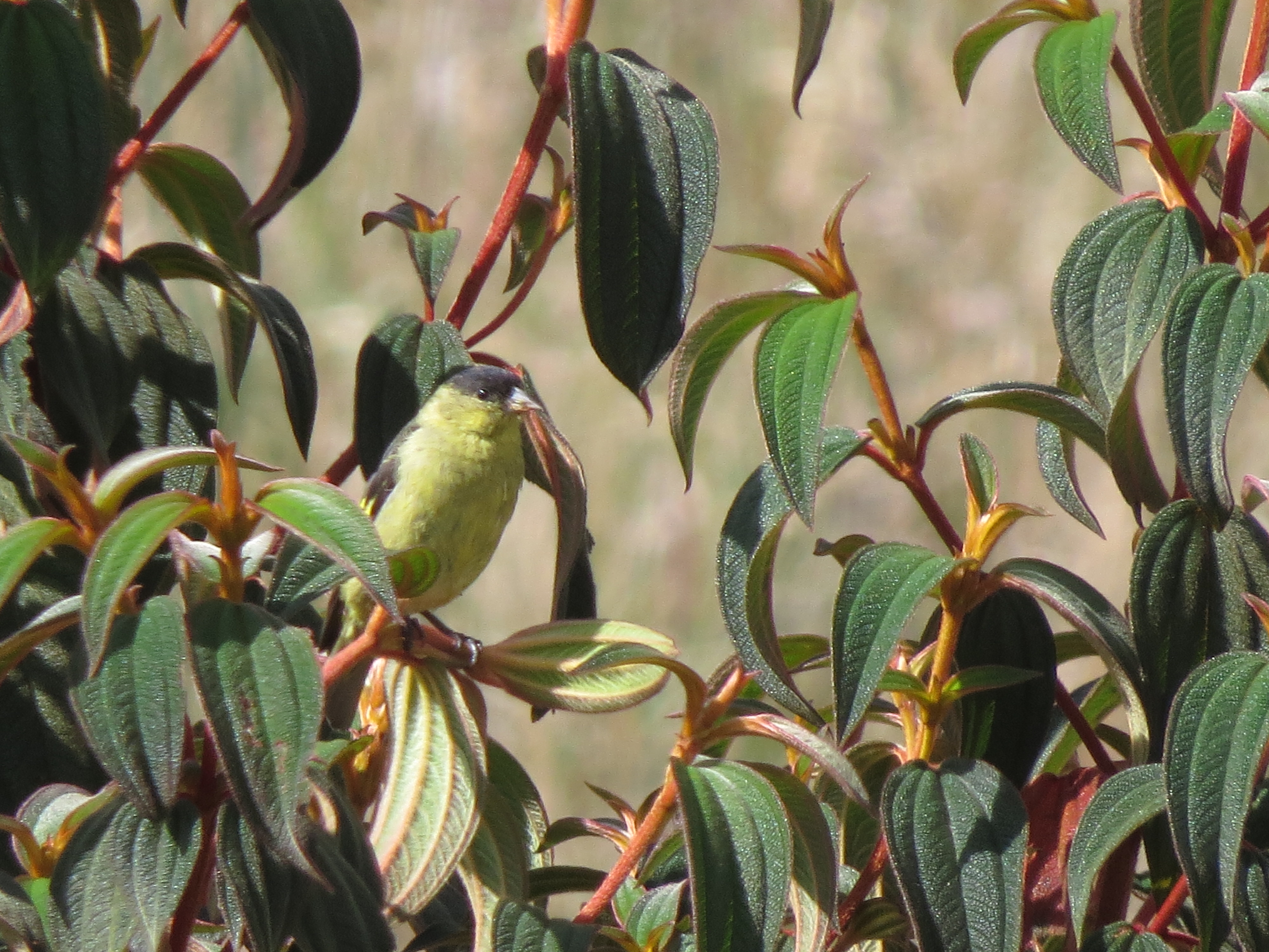 Sporagra spinescens (Jilguero andino)